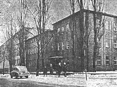 Widok Instytutu Metali Nieżelaznych w Gliwicach w latach pięćdziesiątych XX wieku.